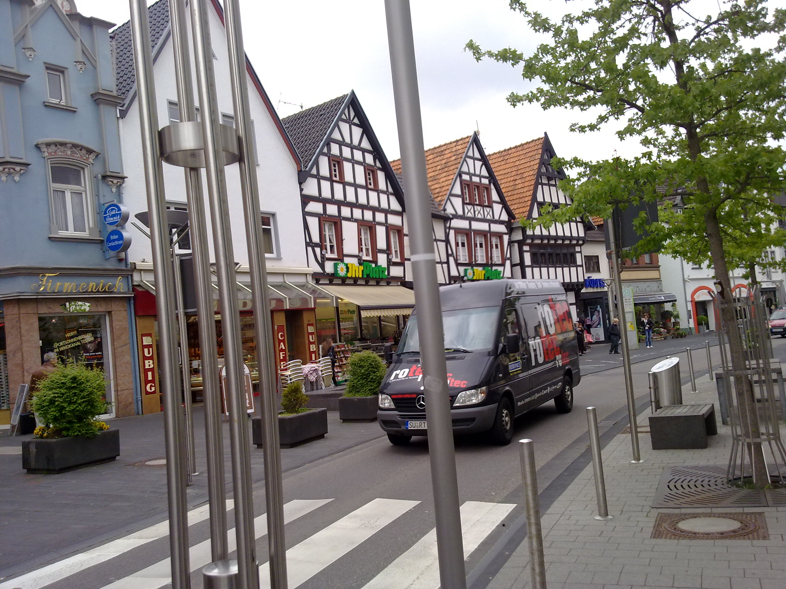 صوره لمدينة راينباخ